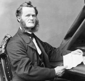 Bodwell, Ebenezer Vining M.P. (Oxford S.) 1827 - 1889